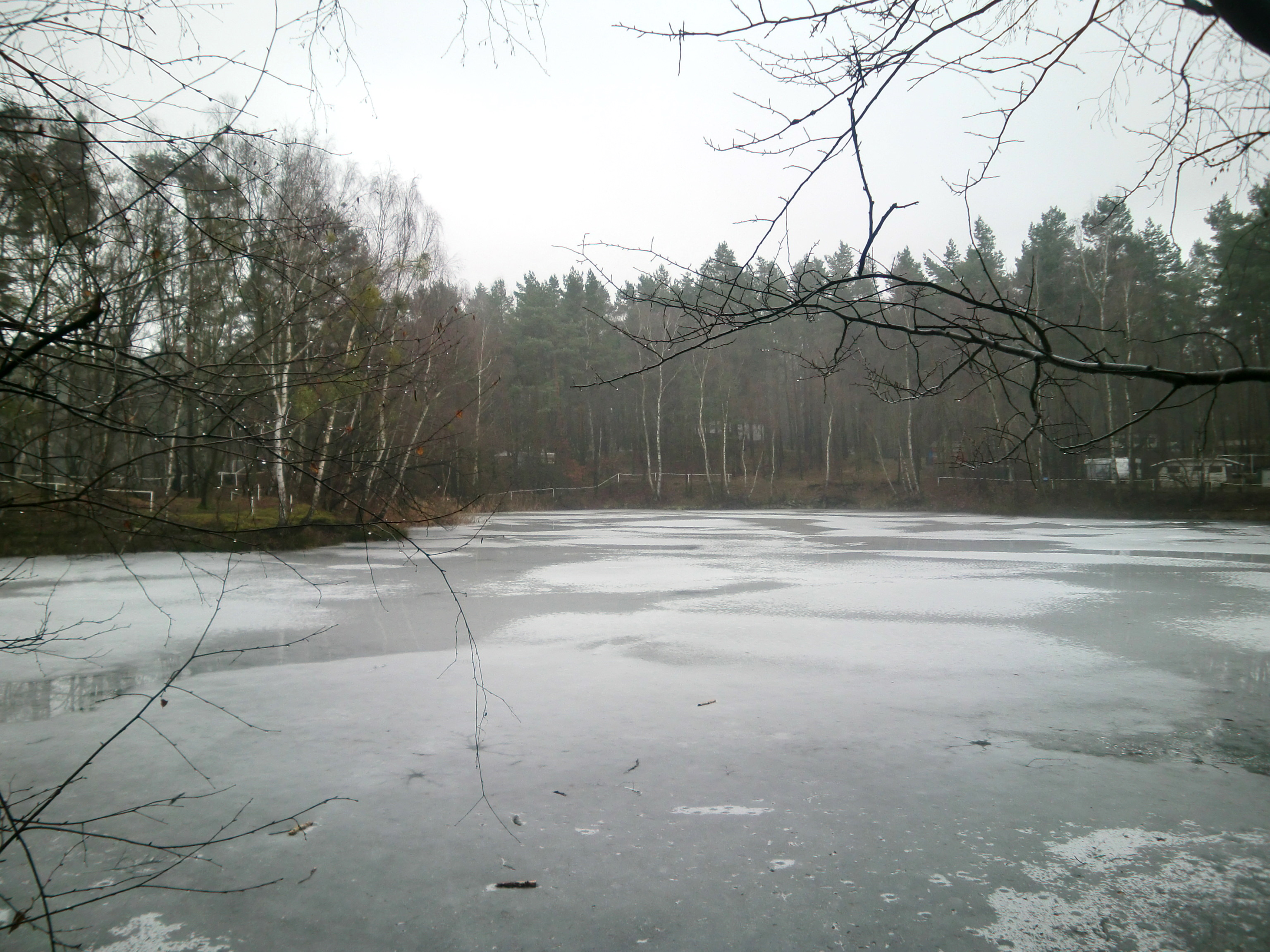 Giselasee bei Plötzky, zugefroren